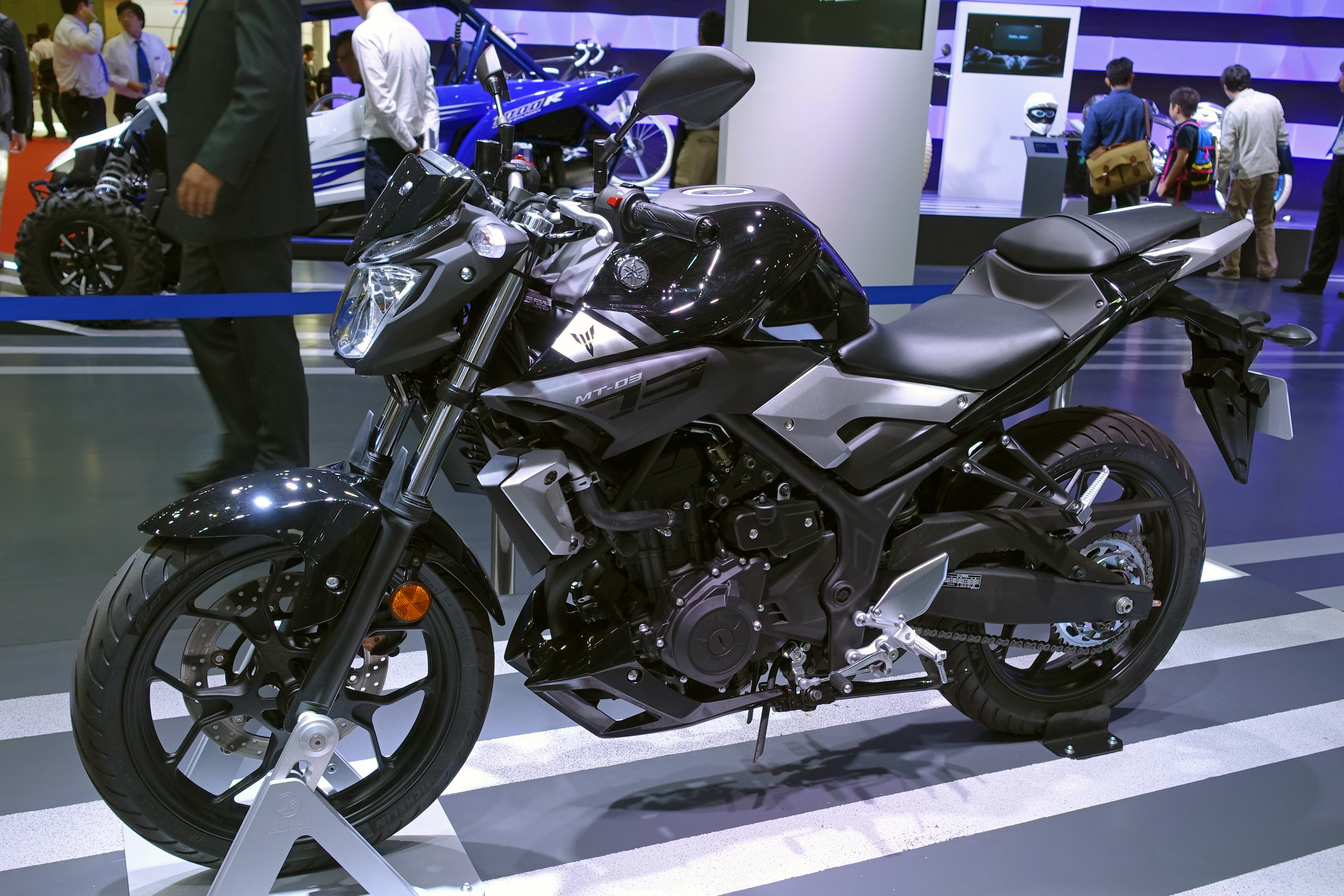 東京モーターショー2015で展示されていたヤマハ・MT-03